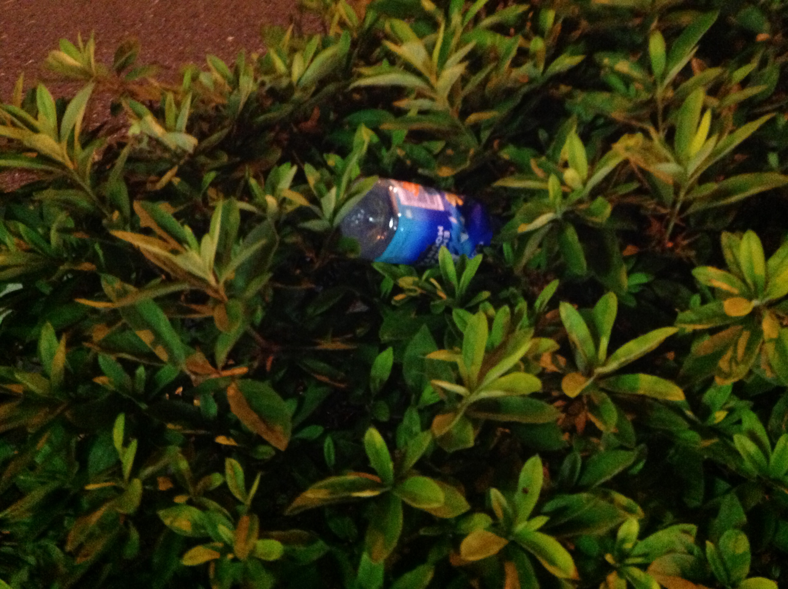 植え込みにポイ捨てされたコーヒーのペットボトル・ゴミ拾いアプリで回収の際撮影